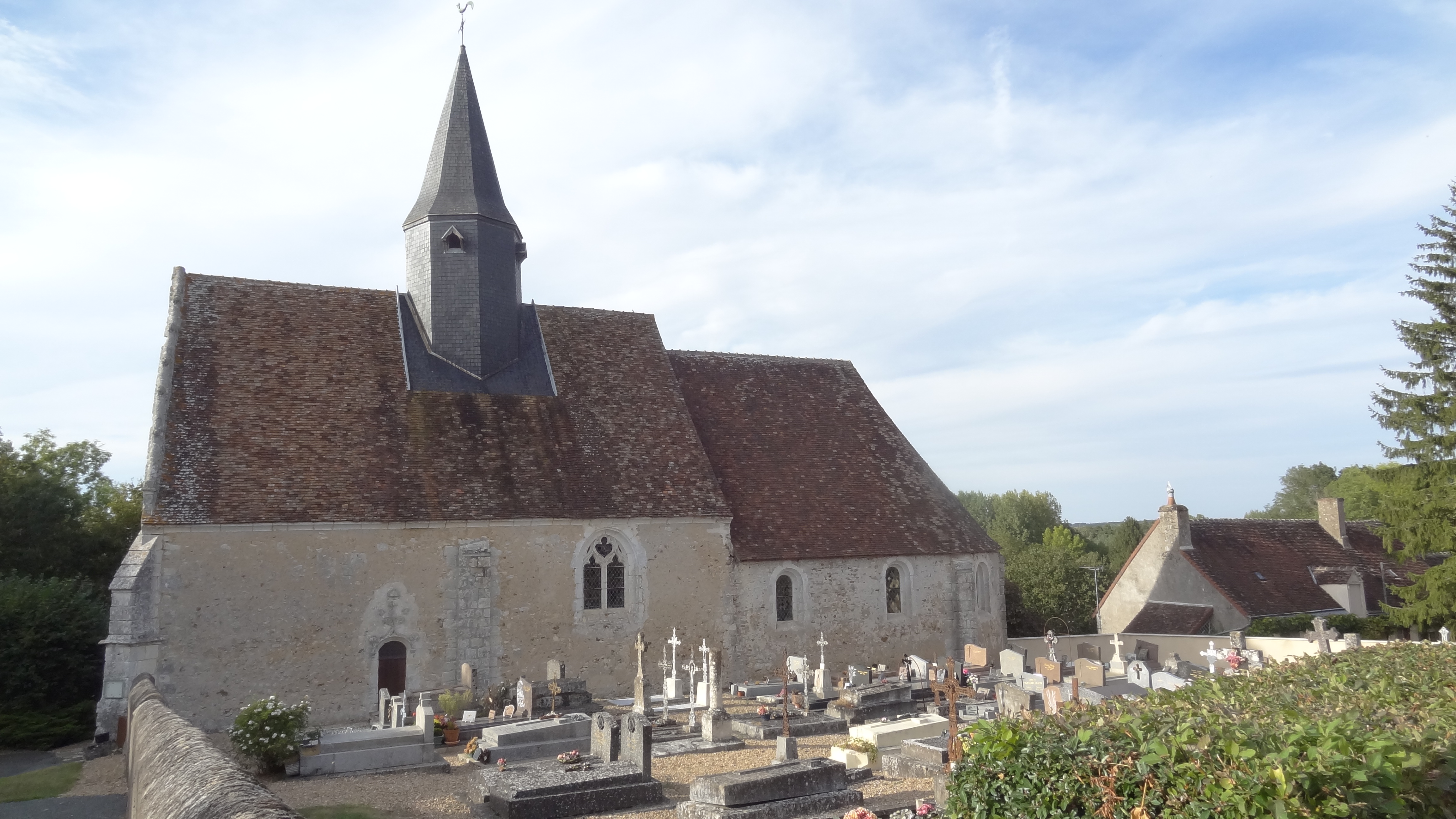 Église de Saint-Claude, Brévainville, Loir-et-Cher, France